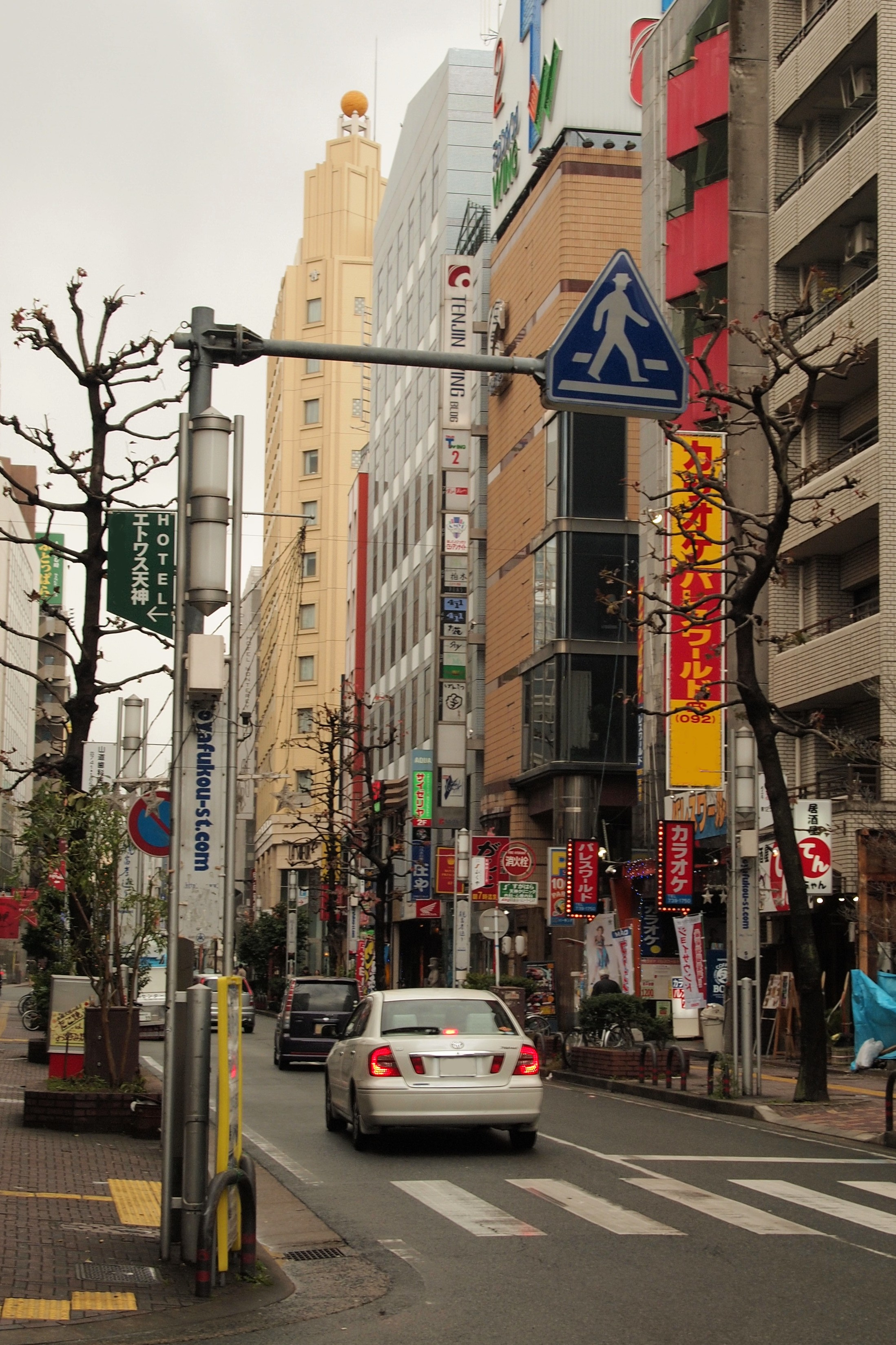 福岡市中央区の親不孝通り。